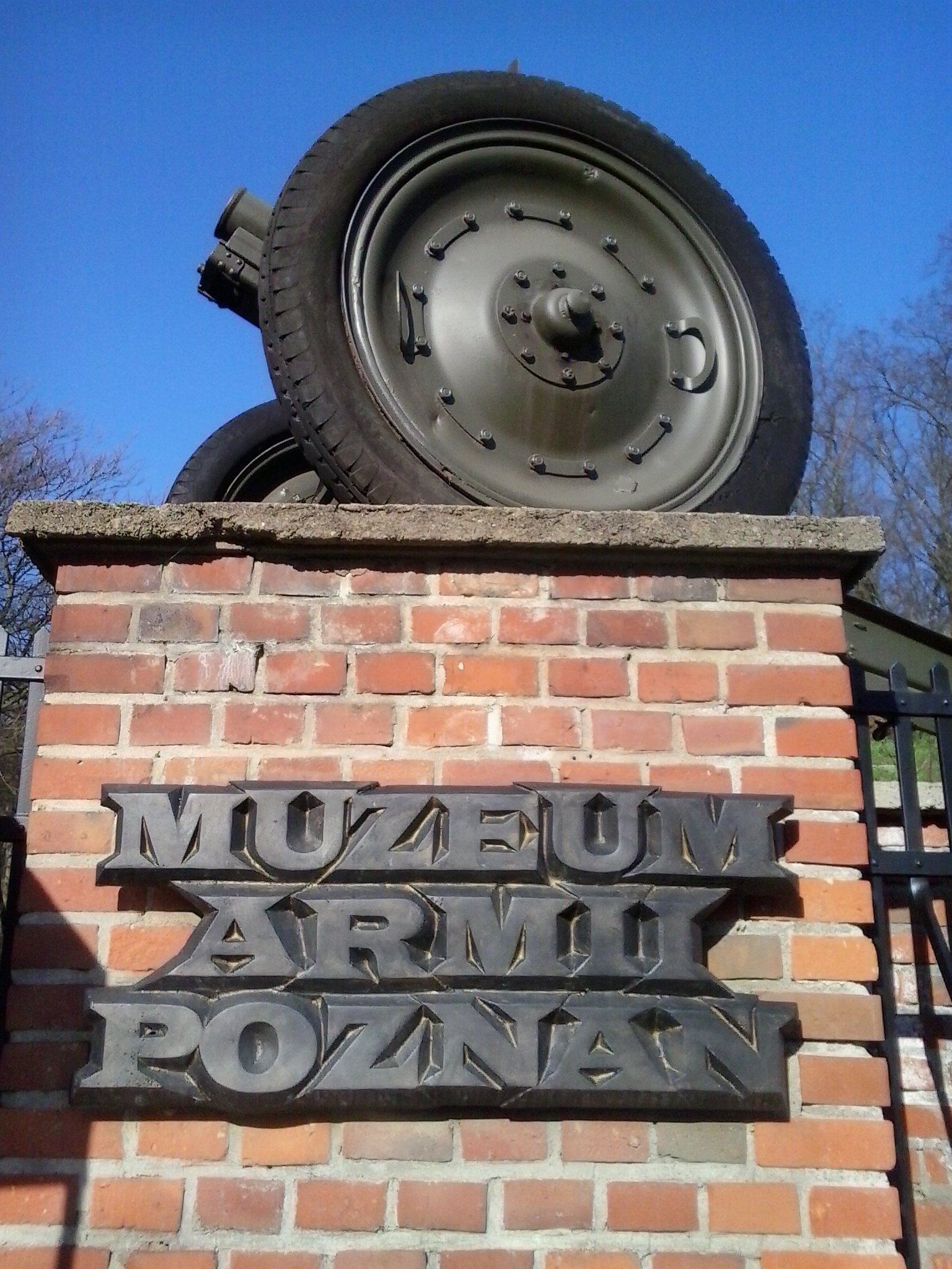 Muzeum Armii Poznań w Poznaniu - Cytadela, Mała Śluza.